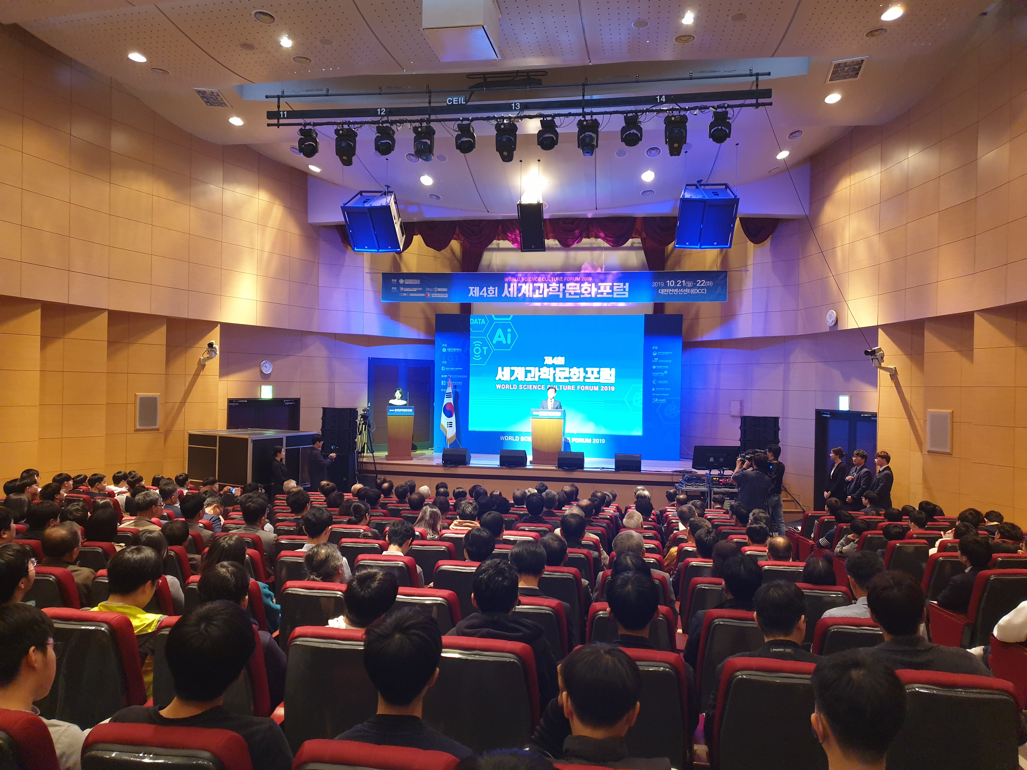 2019 대전사이언스페스티벌 세계과학문화포럼